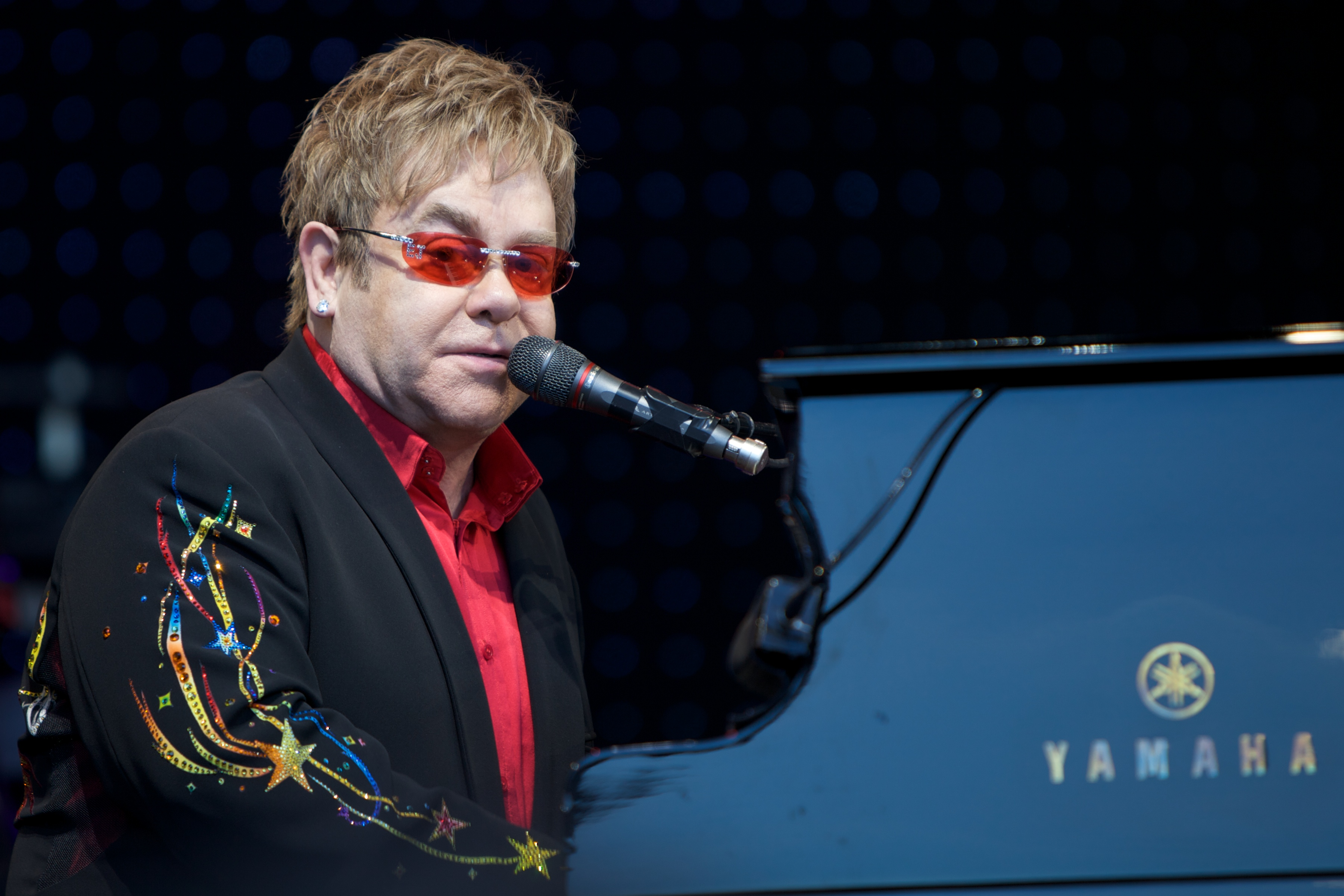 Skagerak Arena, Skien, June 20th 2009